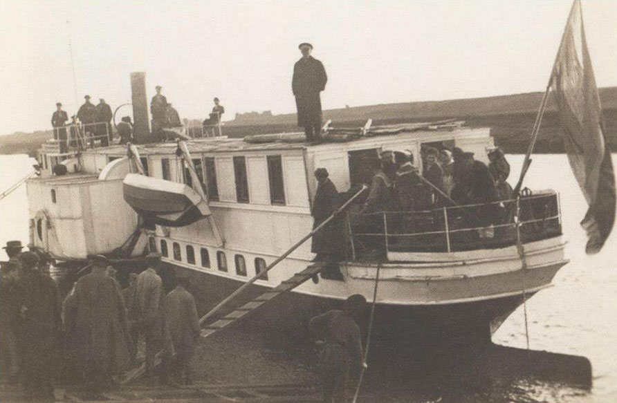 Беларуская (тарашкевіца): Копысь (Kopyś), Дняпро (Dniapro)